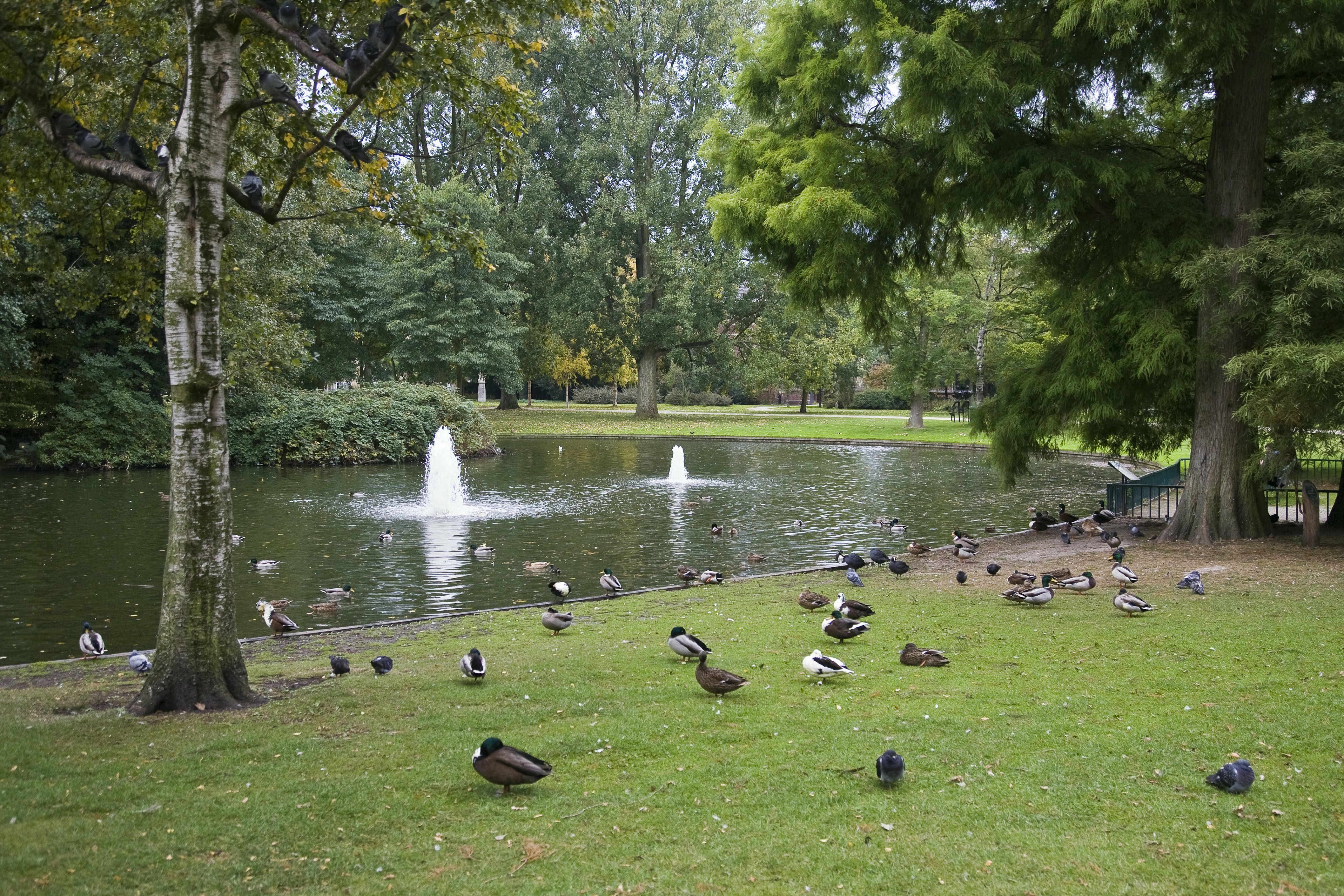 Westerpark: Overzicht Westerpark met eenden en fonteinen (opmerking: Gefotografeerd t.b.v. publicatie "Tussen Haarlemmerpoort en Halfweg" (auteurs: Jaap Evert Abrahamse - Menne Kosias en Erik Schmitz))